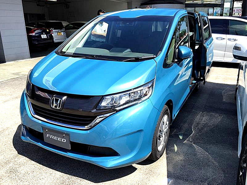 ホンダ・フリード G・ホンダセンシング